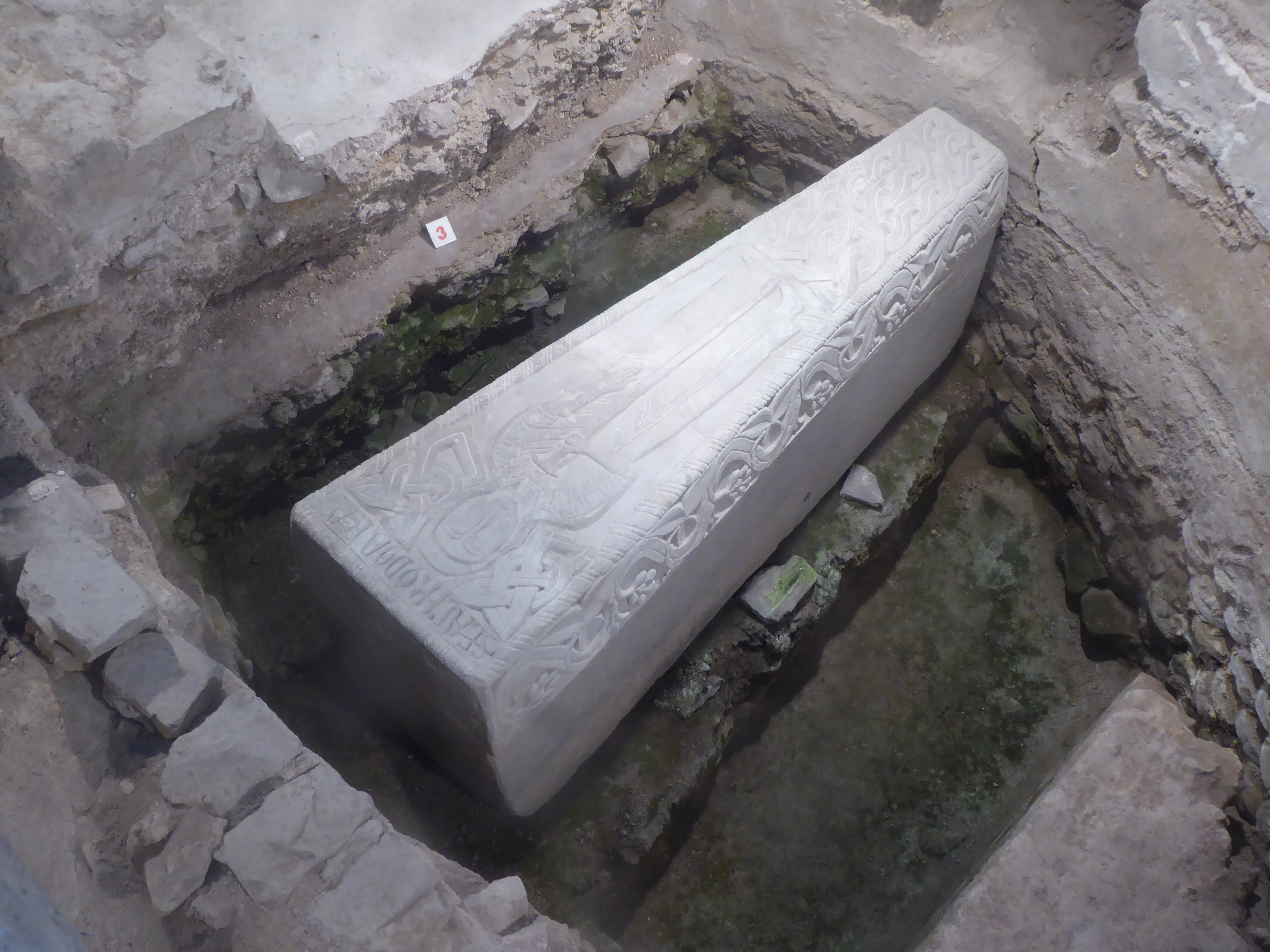 Sarcophage mérovingien du 7ème siècle , visible par des vitres dans le sol du choeur de la collégiale Saint-Ode d'Amay à l'endroit où il fut découvert le 22 janvier 1977. Classé comme trésor de la Communauté Française le 12 février 2010.